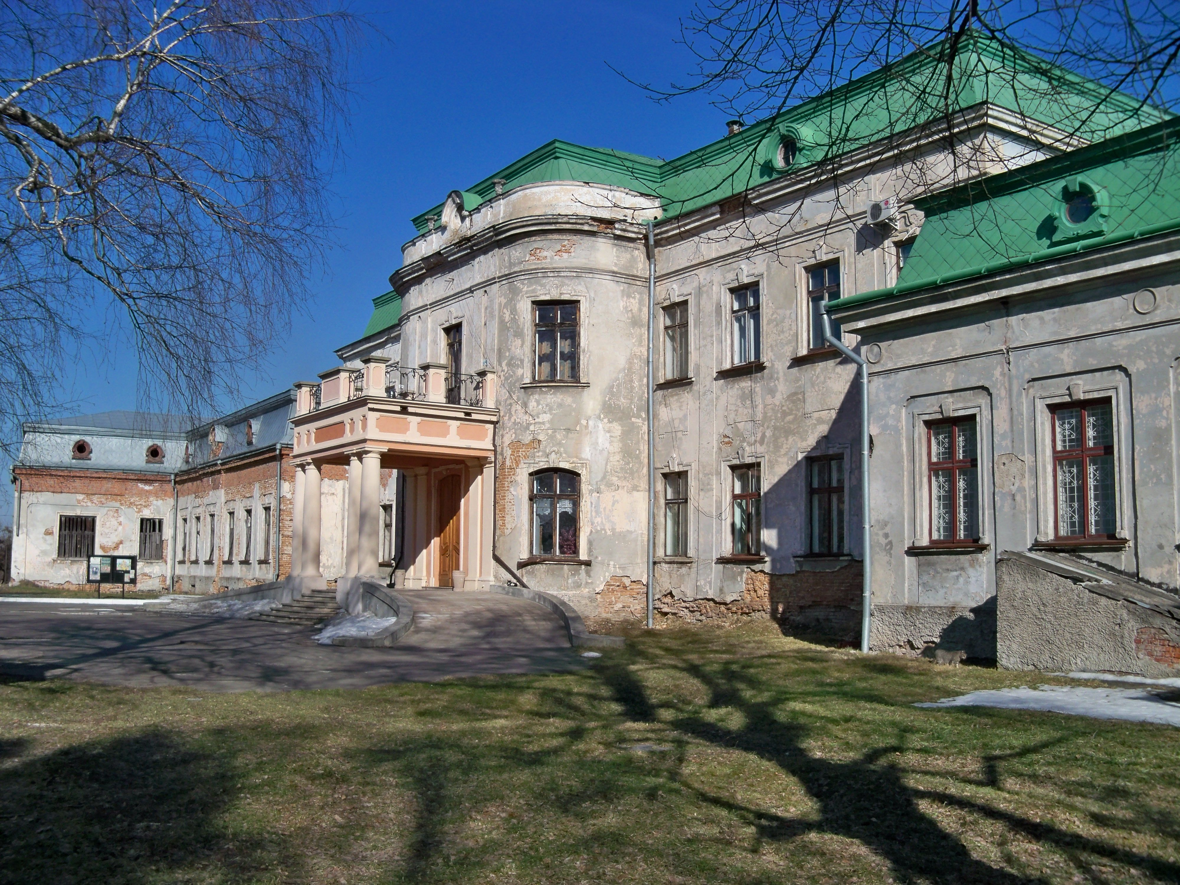 Палац Потоцьких, Червоноград, вул. М.Шашкевича,10